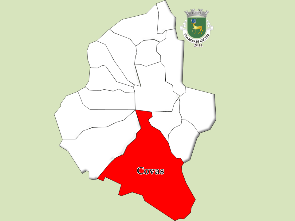 Censos 1864/2011